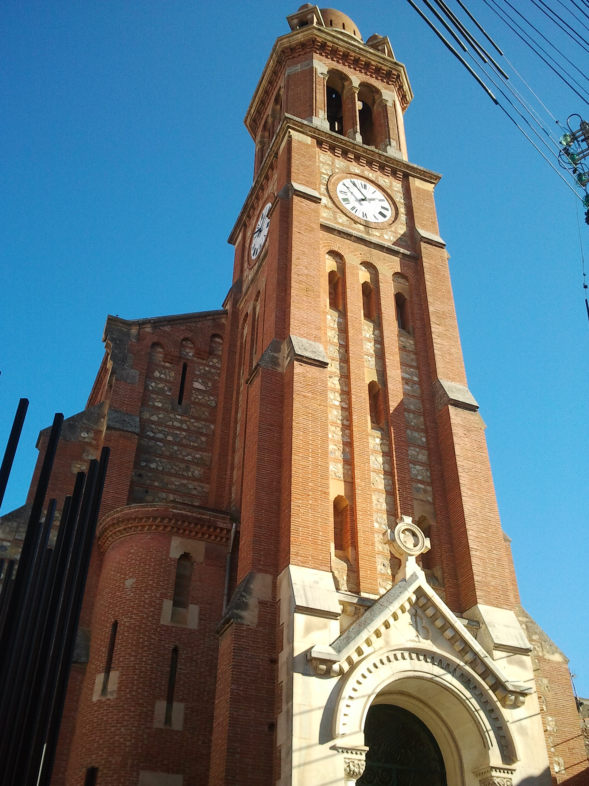 Clocher de l'église de Pézilla-la-Rivière